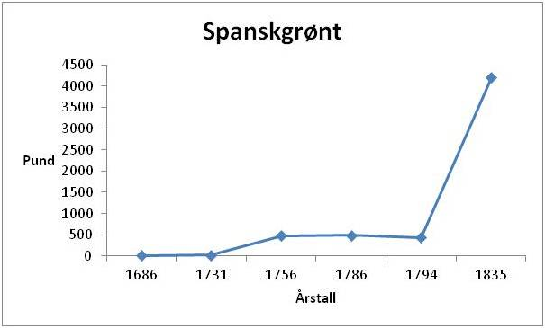 Mengde importer spanskgrønt slik det fremkommer i varelisten til de "Historiske toll- og skipsanløpslister"